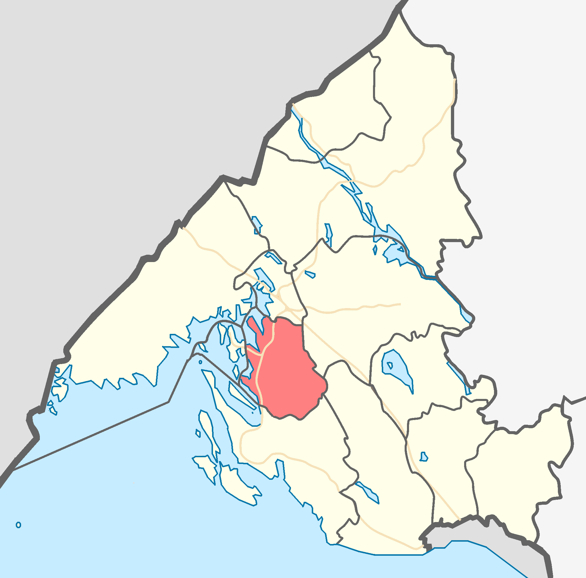 МО Советское городское поселение на карте Выборгского района Ленинградской области